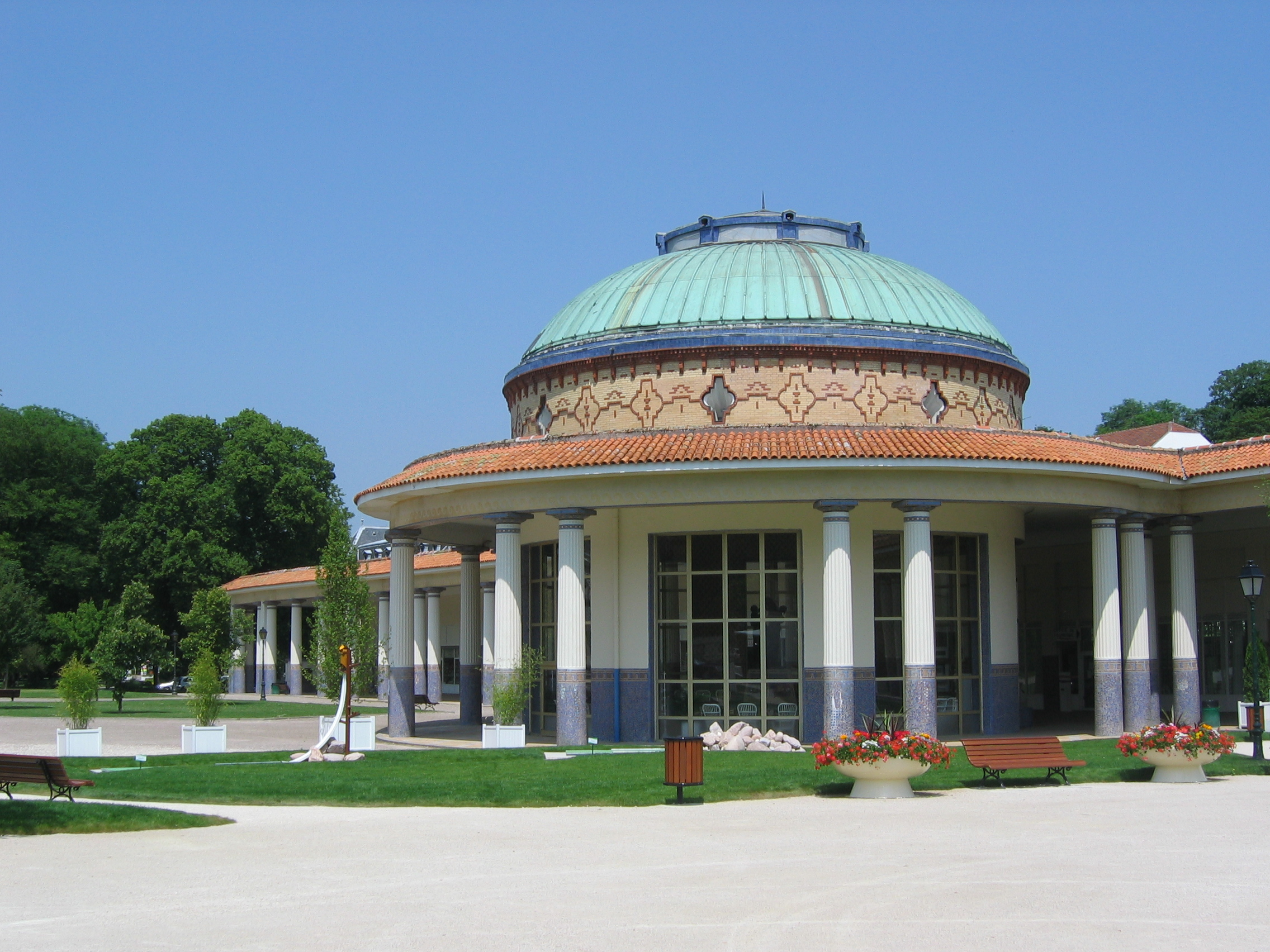 La Rotonde et les galeries des thermes de Contrexéville, Vosges, Lorraine, France